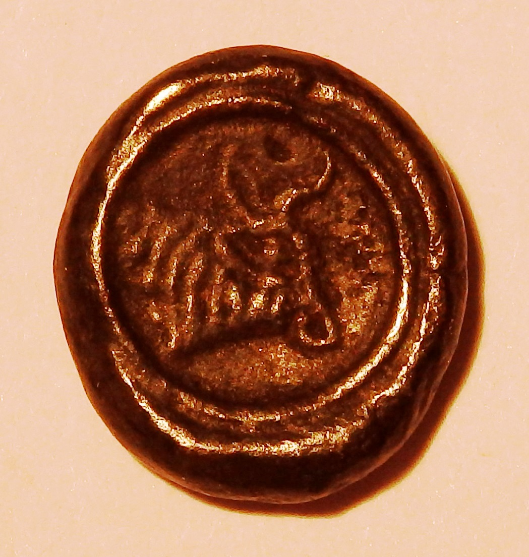 Hemidrachme aus Kolchis, Stierkopf, ca. 500-300 v. Chr. geprägt, Szaivert/Sear Nr. 3600